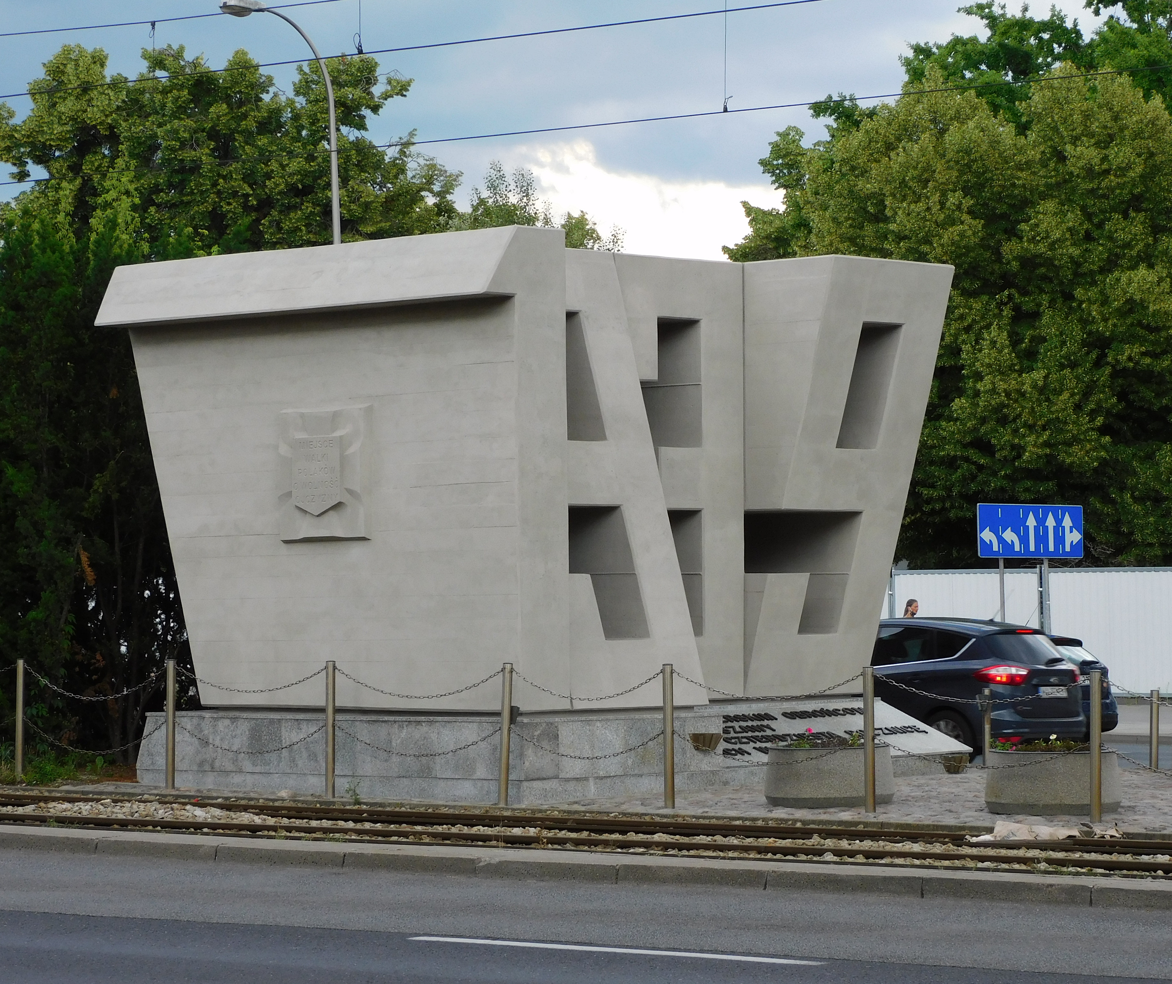 Pomnik Barykada Września w Warszawie po renowacji w latach 2019/2020, w tym usunięciu licznych tablic pamiątkowych - odsłonięty na nowo w maju 2020